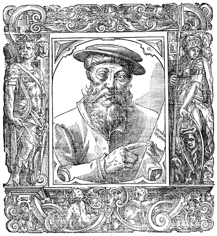 Portrait of Pomponio Gaurico